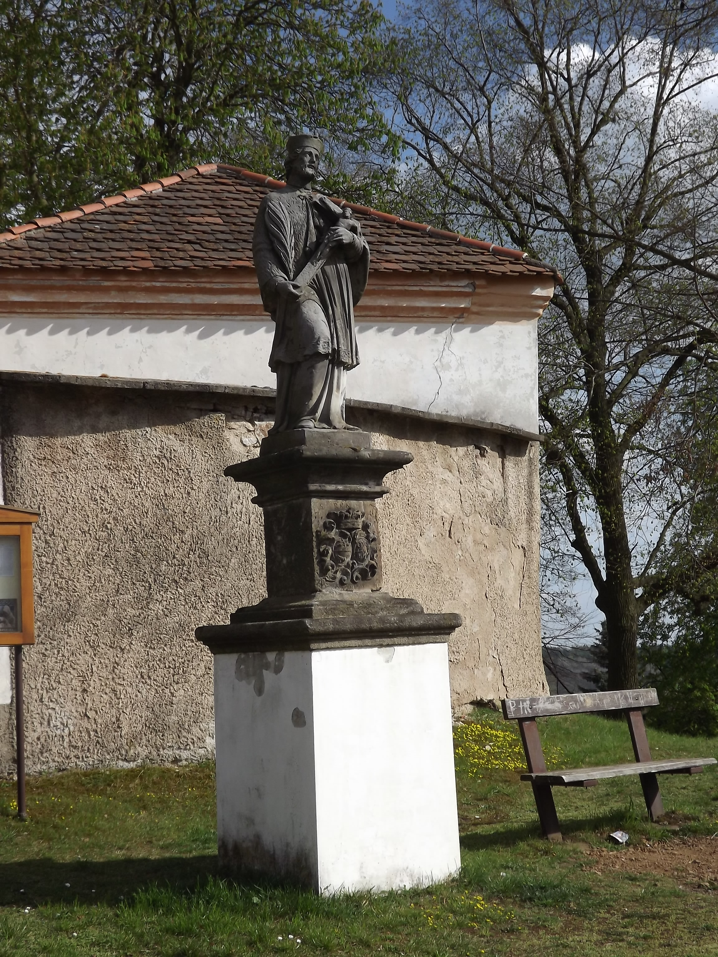 Socha svatého Jana Nepomuckého před kostelem Nanebevzetí Panny Marie, Pičín, okres Příbram.